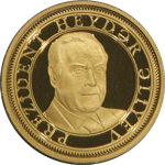 2008-ci ildə Azərbaycan xalqının ümummilli lideri Heydər Əlirza oğlu Əliyevin 85 illik yubileyinin ölkə miqyasında qeyd olunması ilə əlaqədar Milli Bank tərəfindən Avstriyanın Austrian Mint şirkətində nominalı 100 manat olan qızıl xatirə sikkələri sifariş edilərək dövriyyəyə buraxılmışdır.